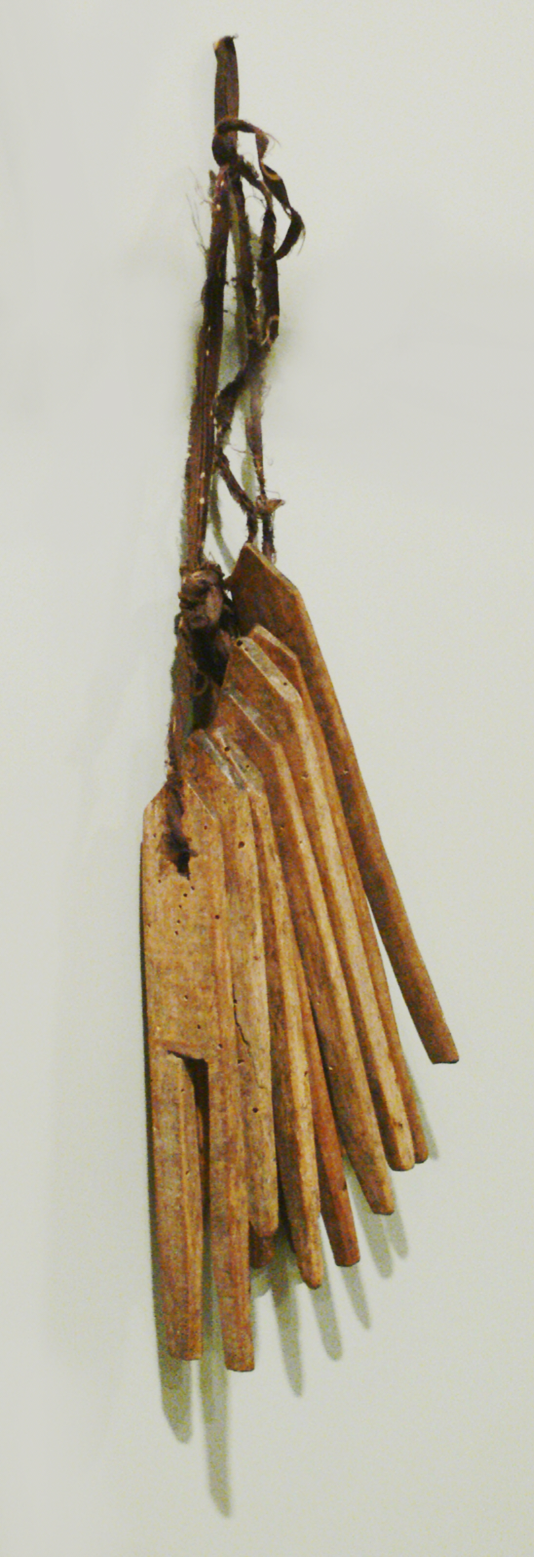 Wäscheklammern, geschnitzt aus Eiche- und Pappel(?)holz, Württemberg, 19./20. Jahrhundert.